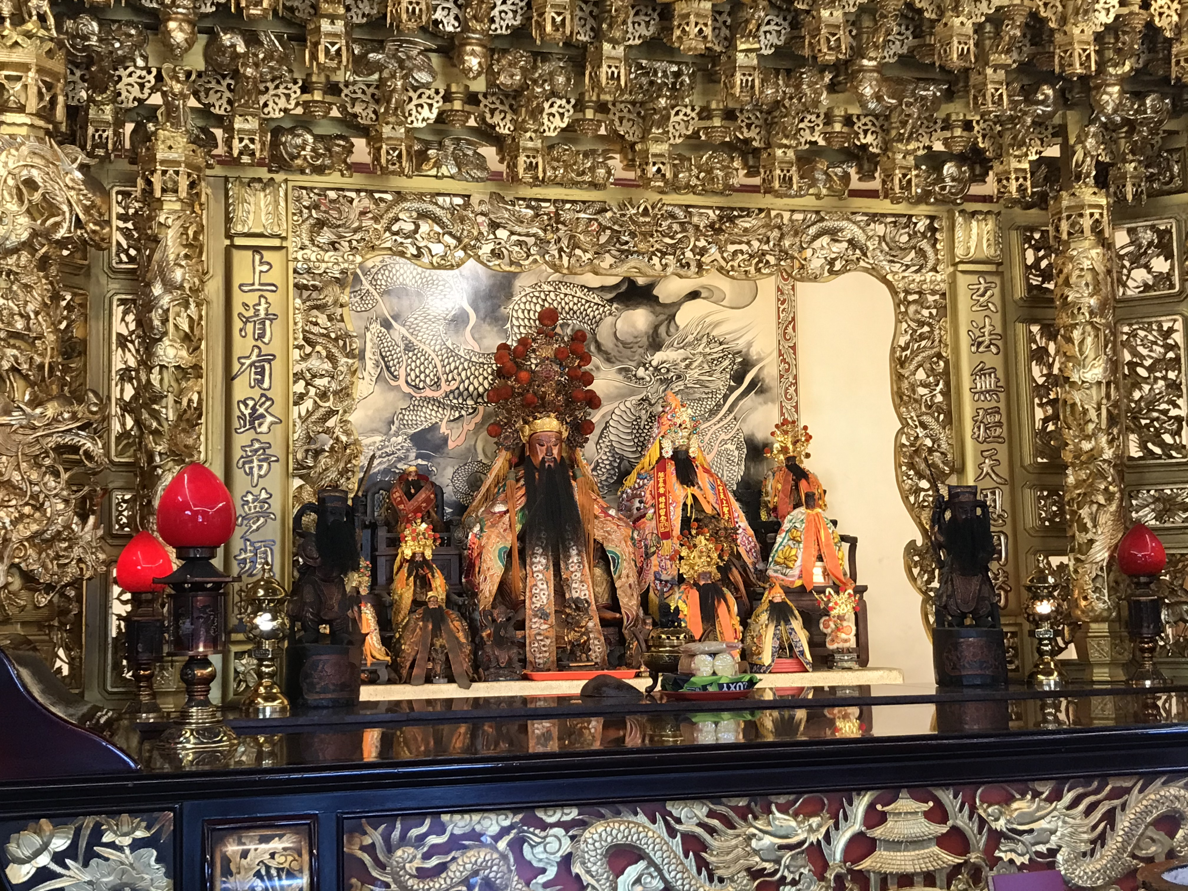 草屯紫微宮神像